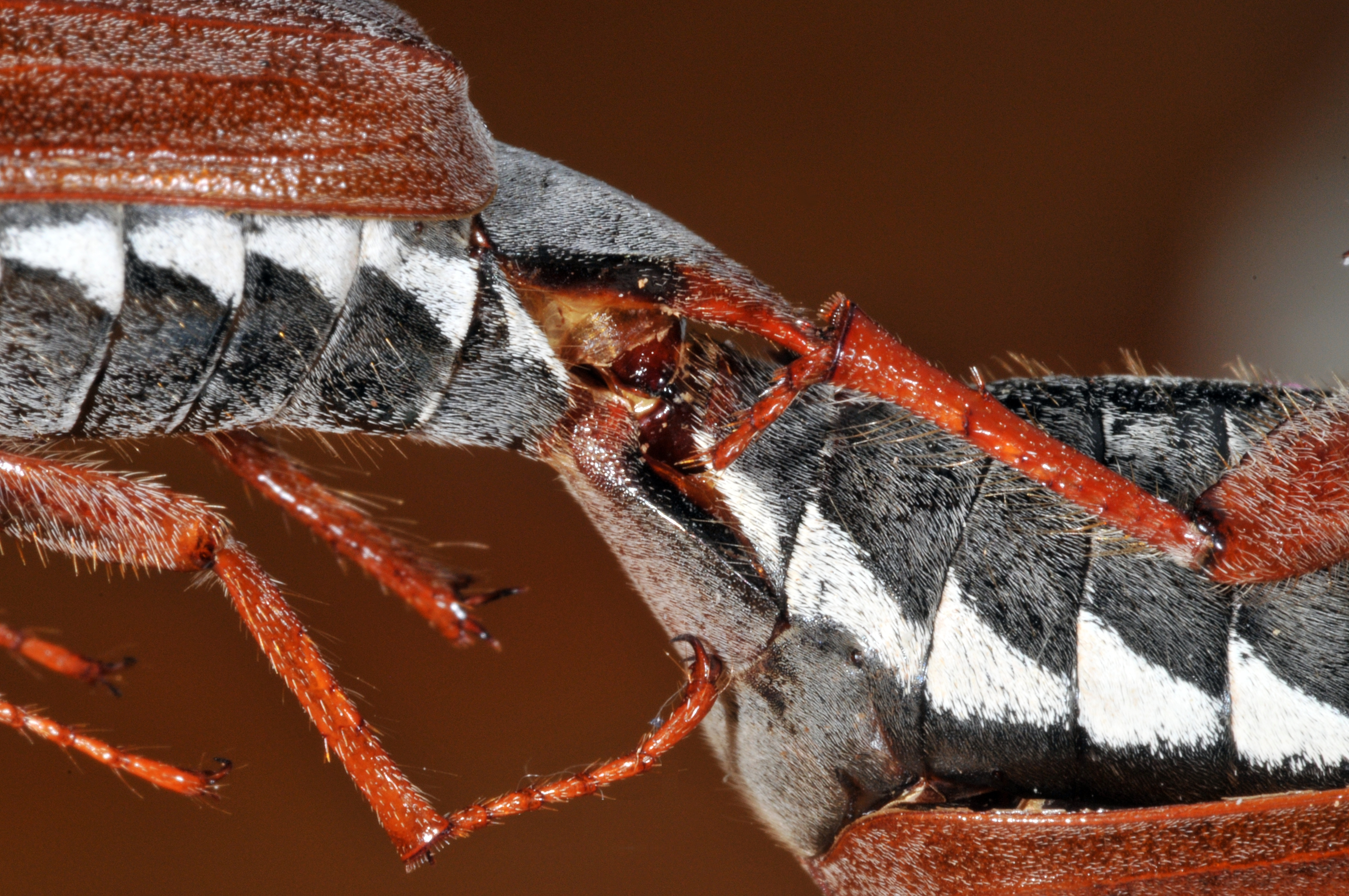 Melolontha melolontha Paarung, Coll. Geller-Grimm im Museum Wiesbaden, Deutschland